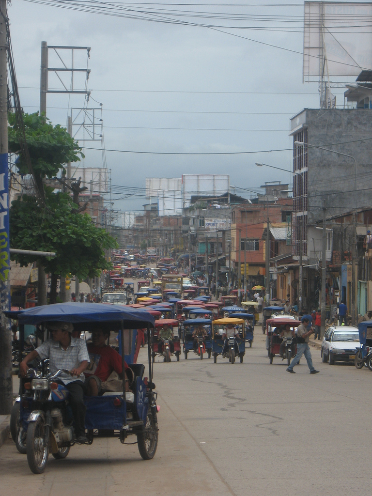 La calle 7 de Junio (en la ciudad de Pucallpa) desde la dirección opuesta a cinco cuadras del río Ucayali.